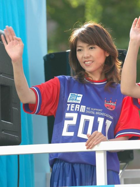 2006年10月8日、御堂筋パレードでPRする地上デジタル放送推進大使。